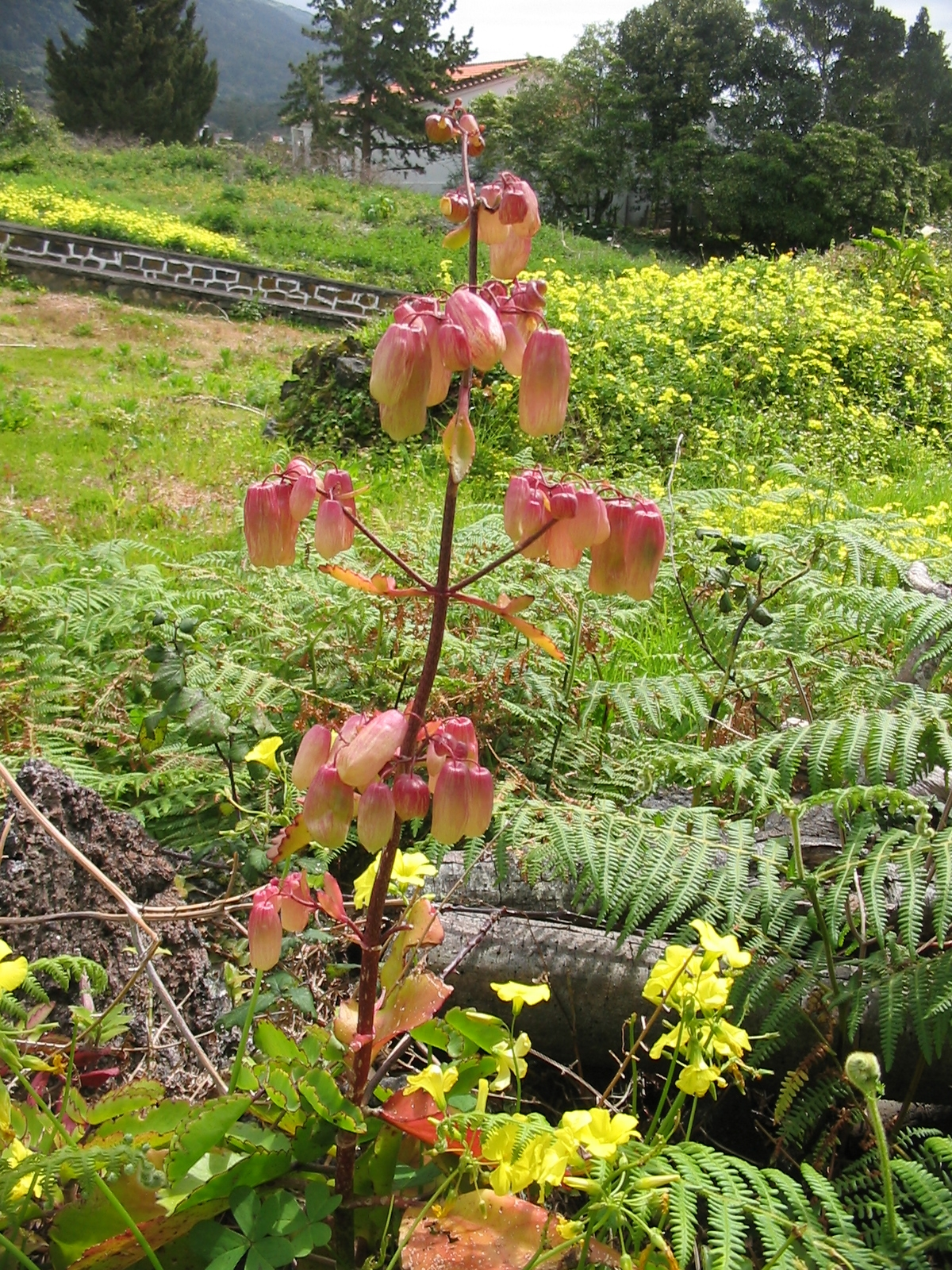 Goethepflanze (Kalanchoe pinnata) - Habitus